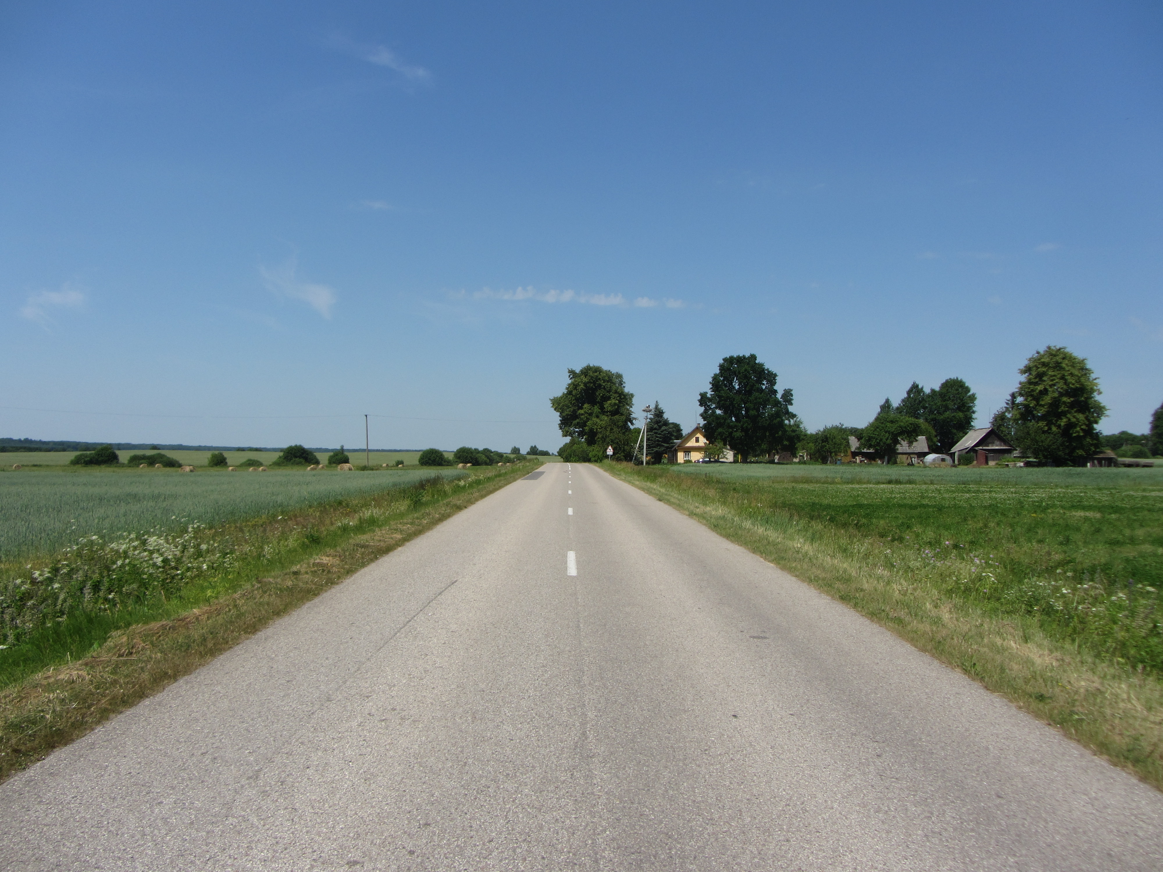 Anciūnai 19100, Lithuania